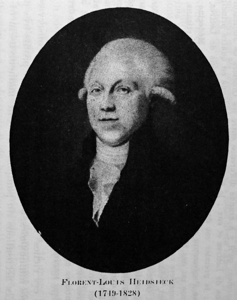 personnalité rémoise.